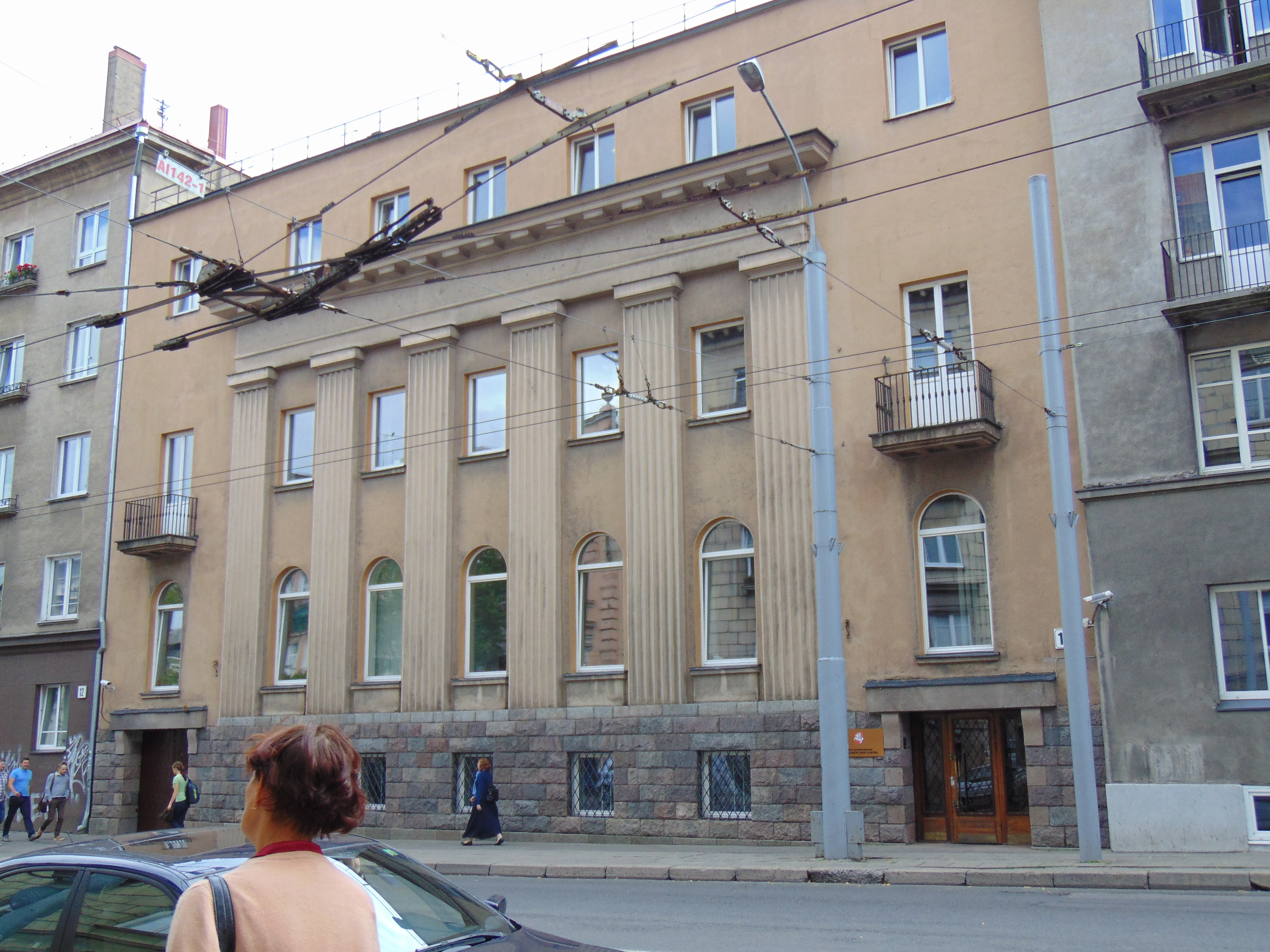 Jogailos g. 14